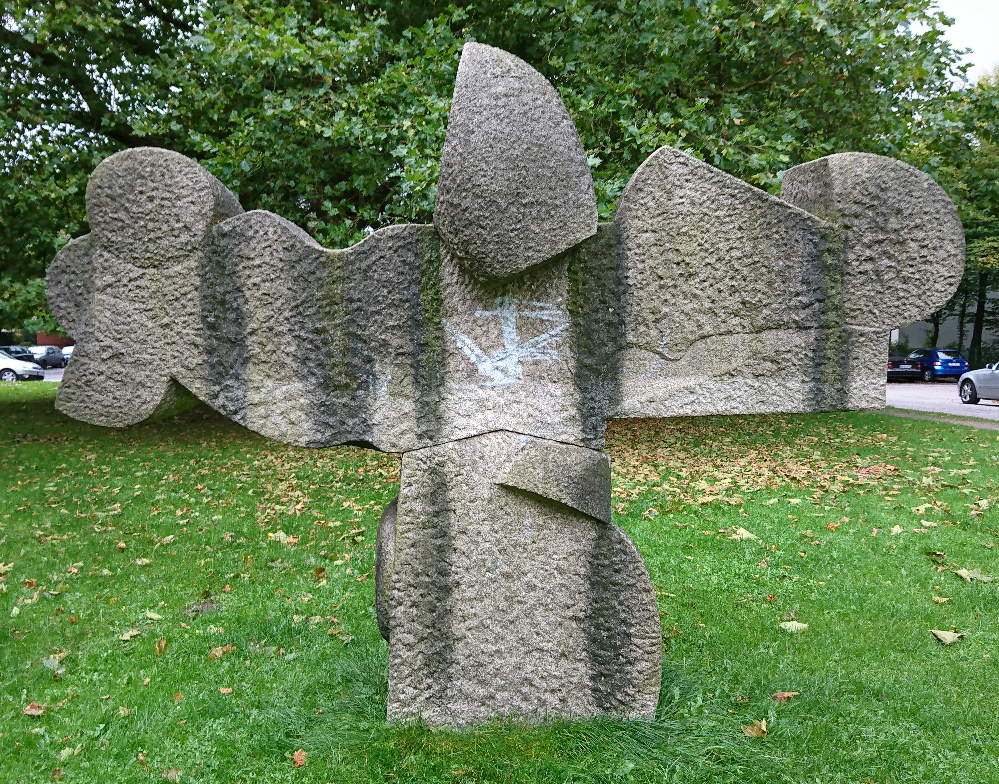 Der Baum von Hans Kock, 1965 aufgestellt an der Tangstedter Landstraße 445, umgesetzt 2017 auf einem Rasen an der Straße Holitzberg 131, 133 (Rückseite des Hauses). Eigentümer: Siemers-Stiftung